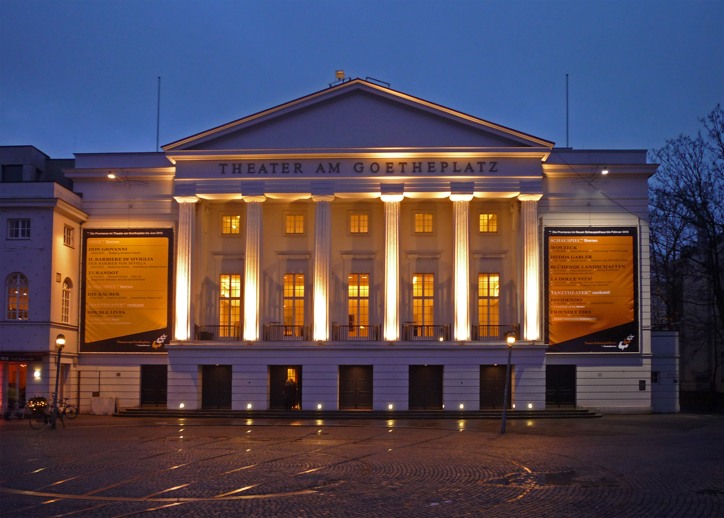 Theater am Goetheplatz Bremen. - Es ist eine der Spielstätten des Theater Bremen.Das abgebildete Objekt ist ein geschütztes Kulturdenkmal in der Freien Hansestadt Bremen, mit der Nr. 1722 beim Landesamt für Denkmalpflege registriert.